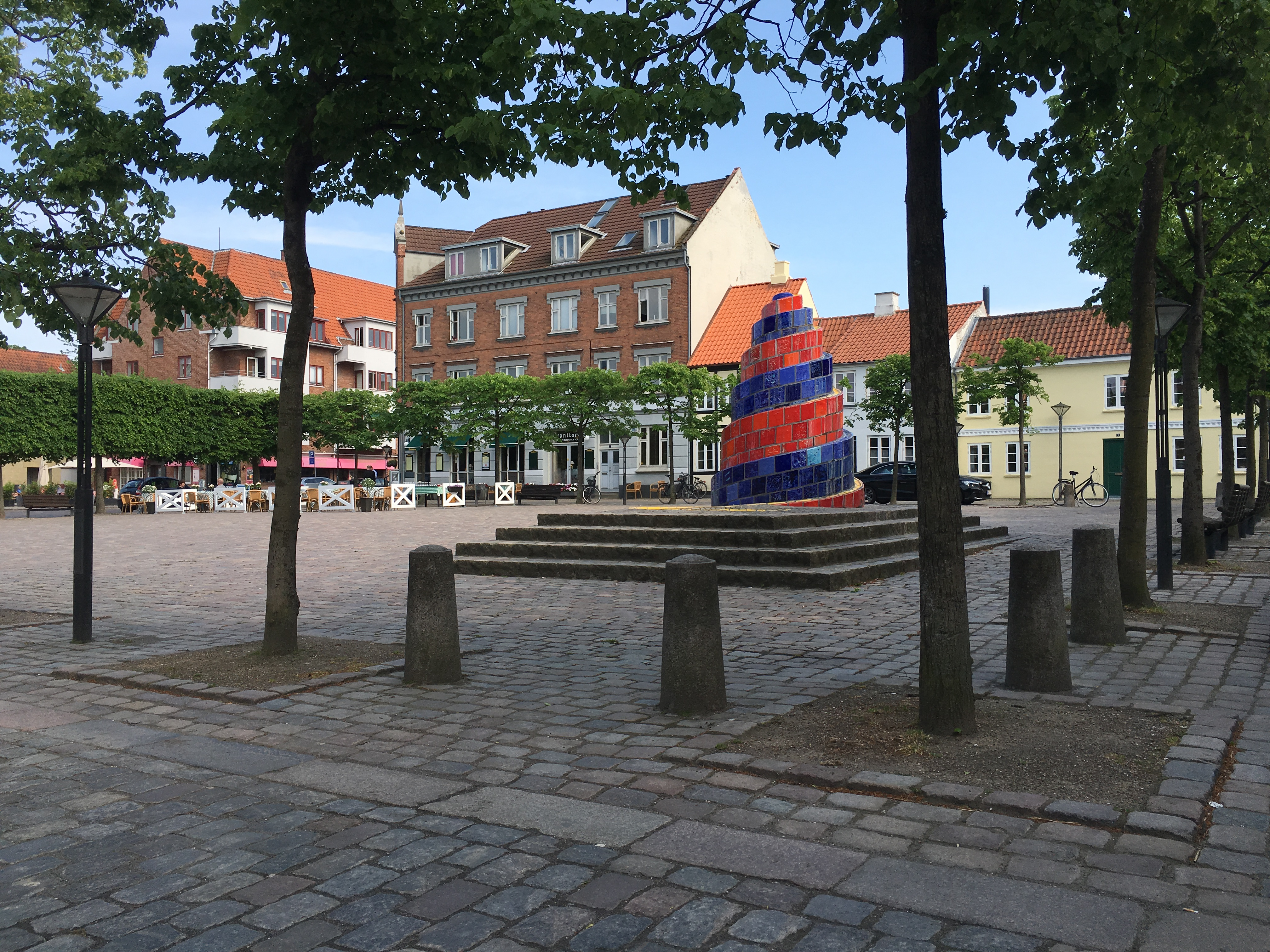 Sortebrødretorv, Odense, DK